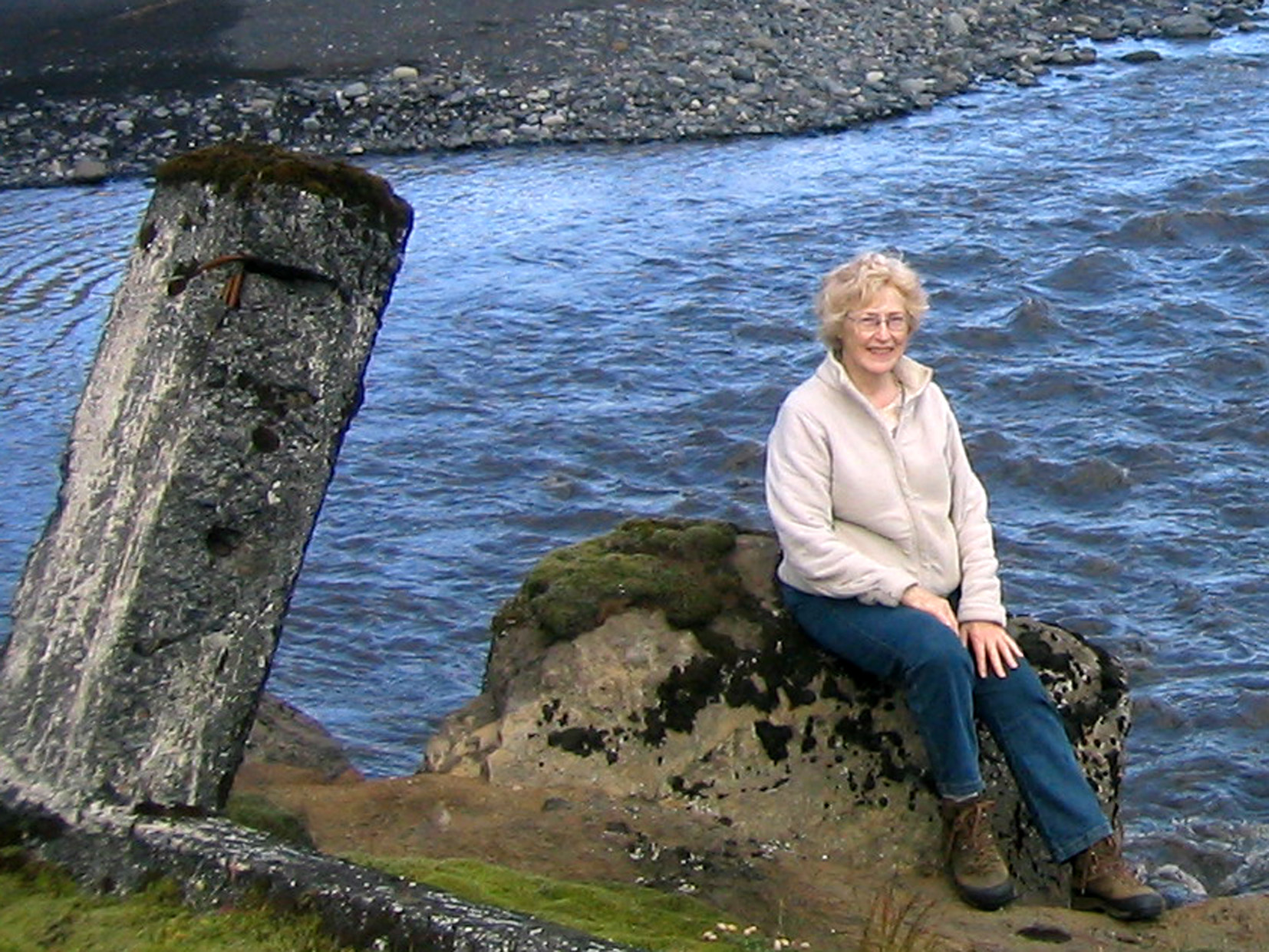 Elsa G. Vilmundardóttir á bökkum Múlakvíslar sumarið 2004